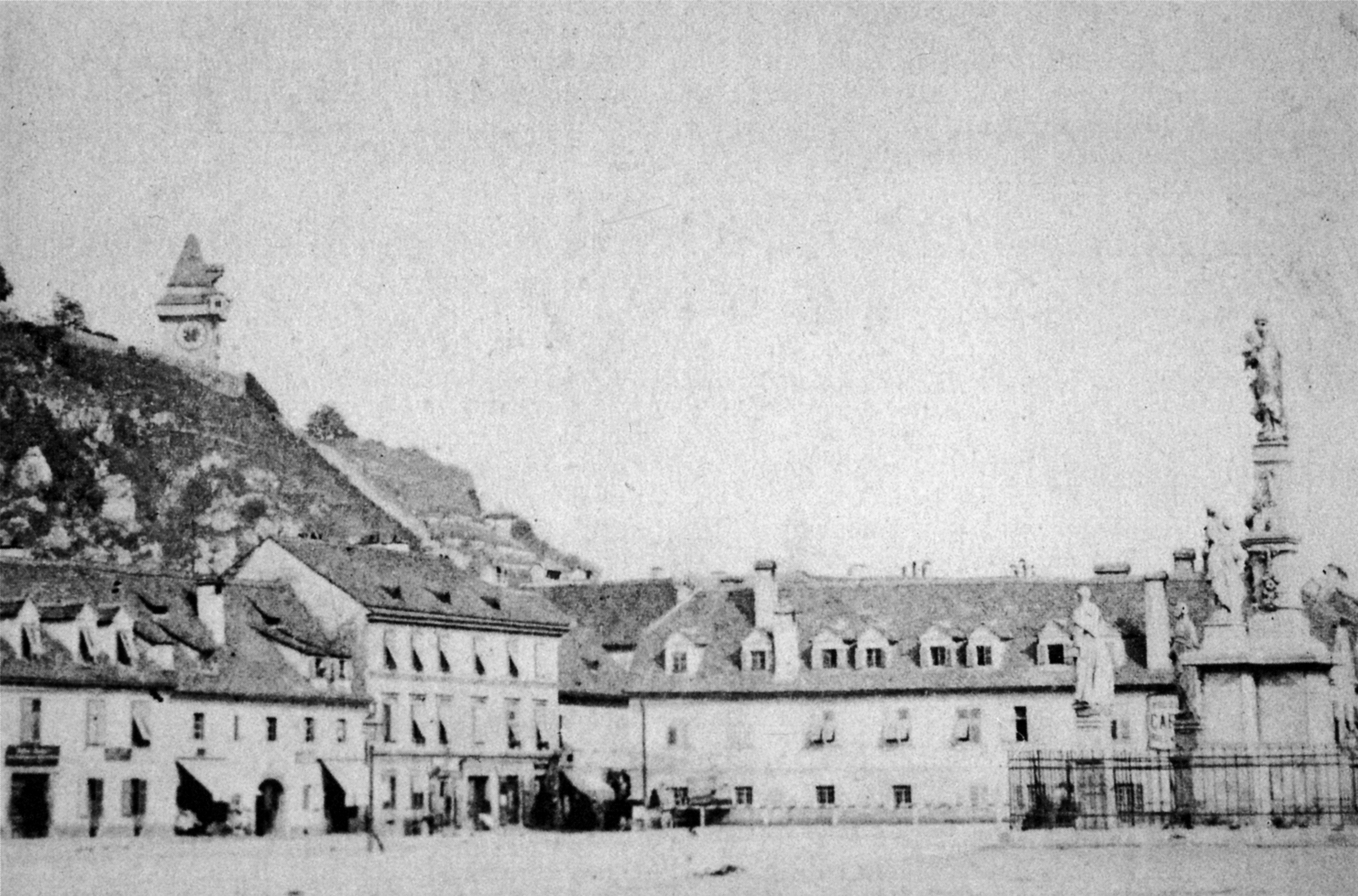 Graz, Lendplatz, vor der Pflanzung der Alleebäume 1878 (Das vielleicht älteste Foto des Lendplatzes. – Gerhard M. Dienes.) Pestsäule